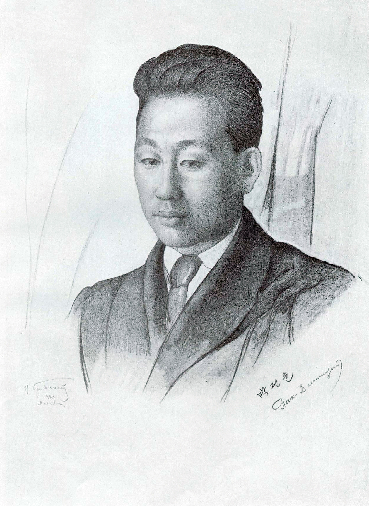 Пак Дин Шунь